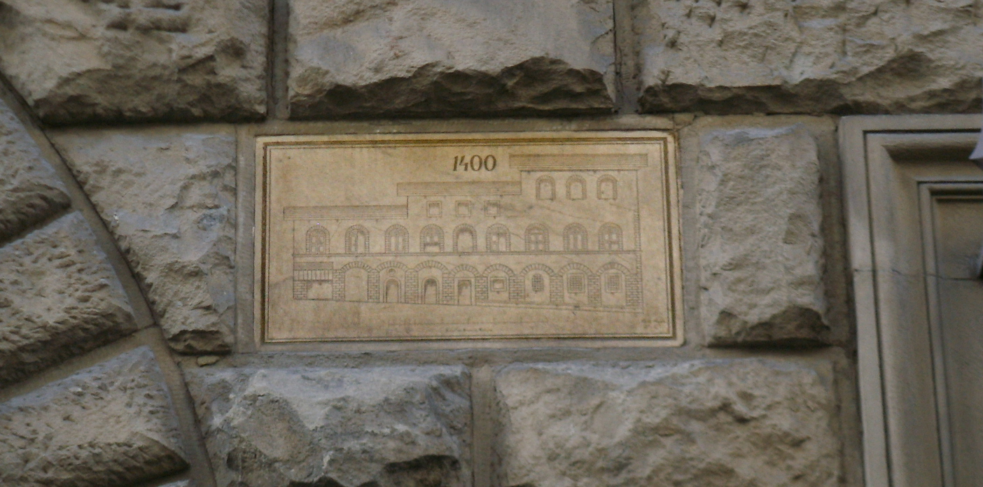 Palazzo malenchini-alberti, targa 1400